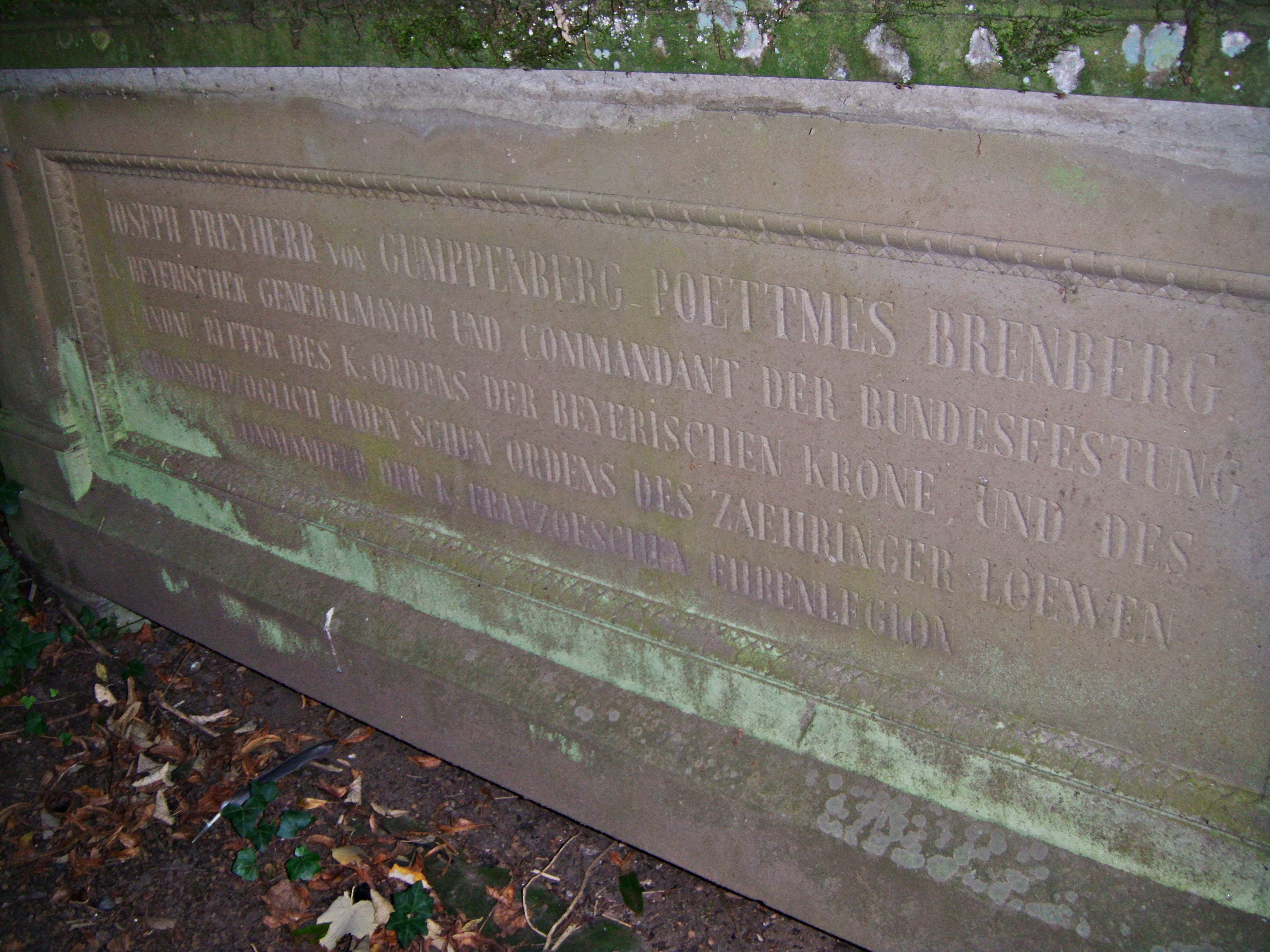 Joseph von Gumppenberg (1798-1855) bayerischer Generalmajor und Kommandant der Festung Landau (Pfalz), Grabmal, Grabinschrift, Friedhof Landau